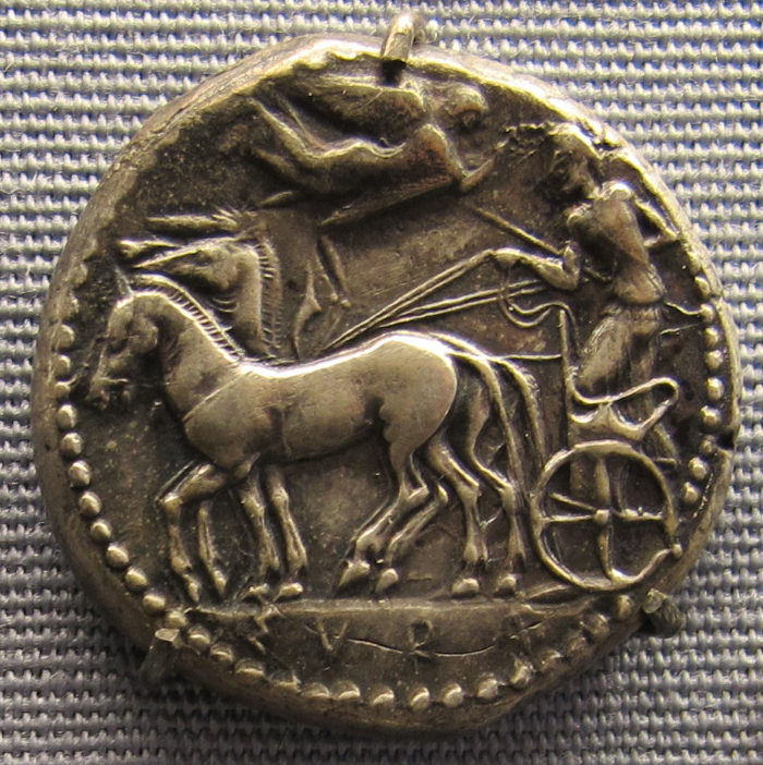 Syrakus, tetradracma, 510-485 ac. ca